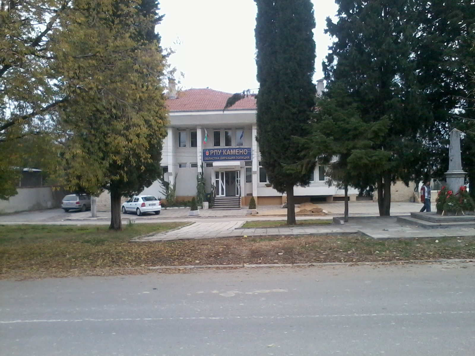 РПУ- Камено